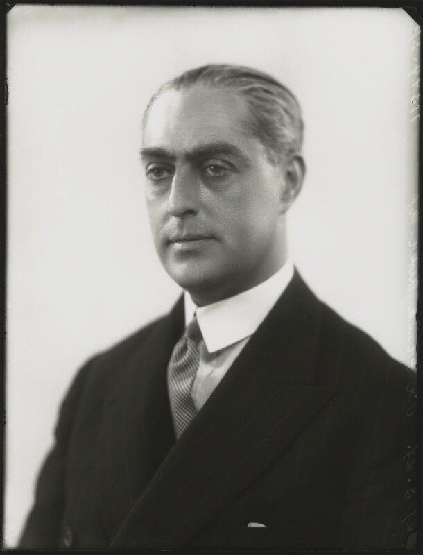 Frank Meyer